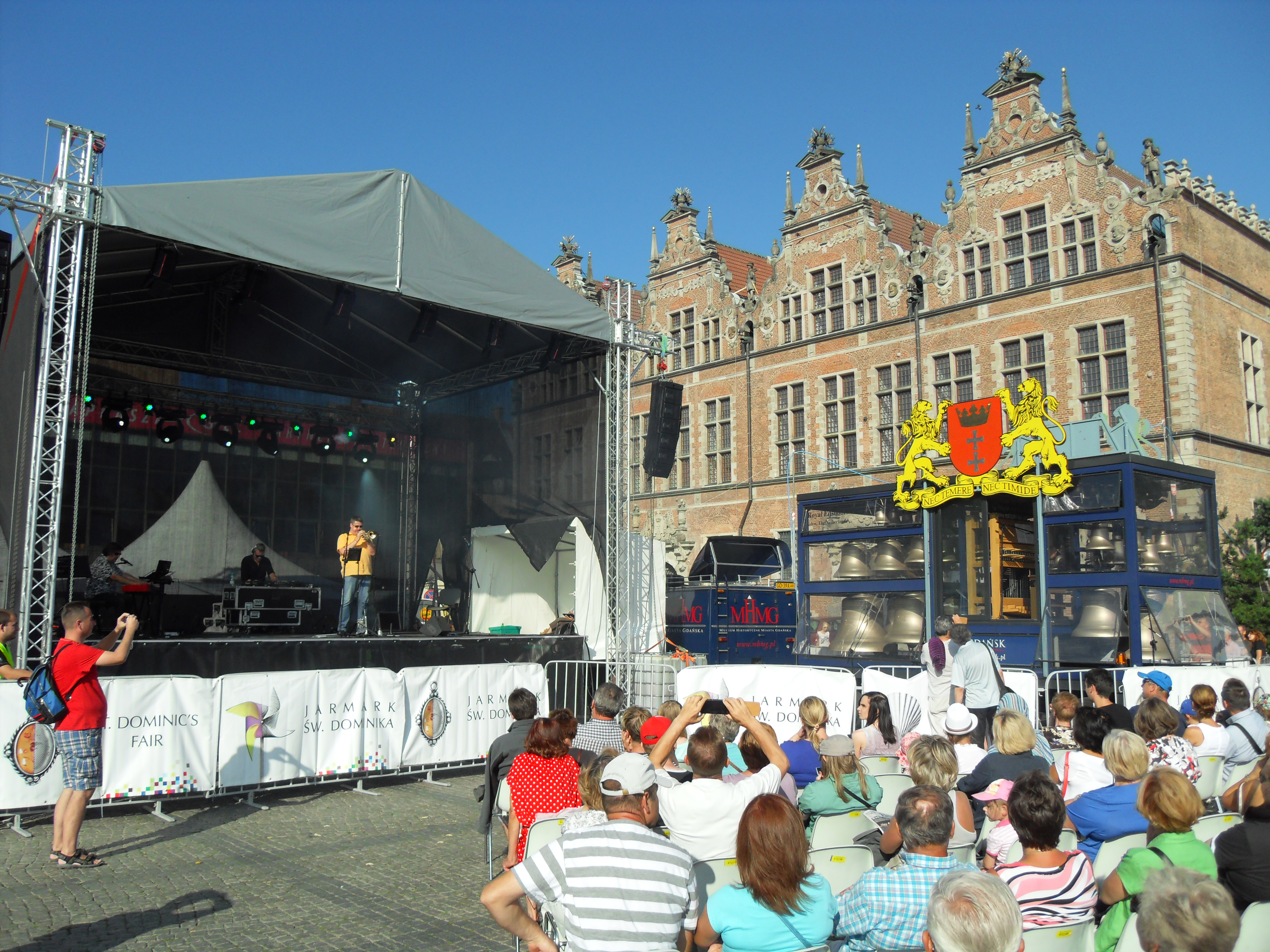 Gdańsk Główne Miasto, Targ Węglowy. XV Gdański Festiwal Carillonowy.